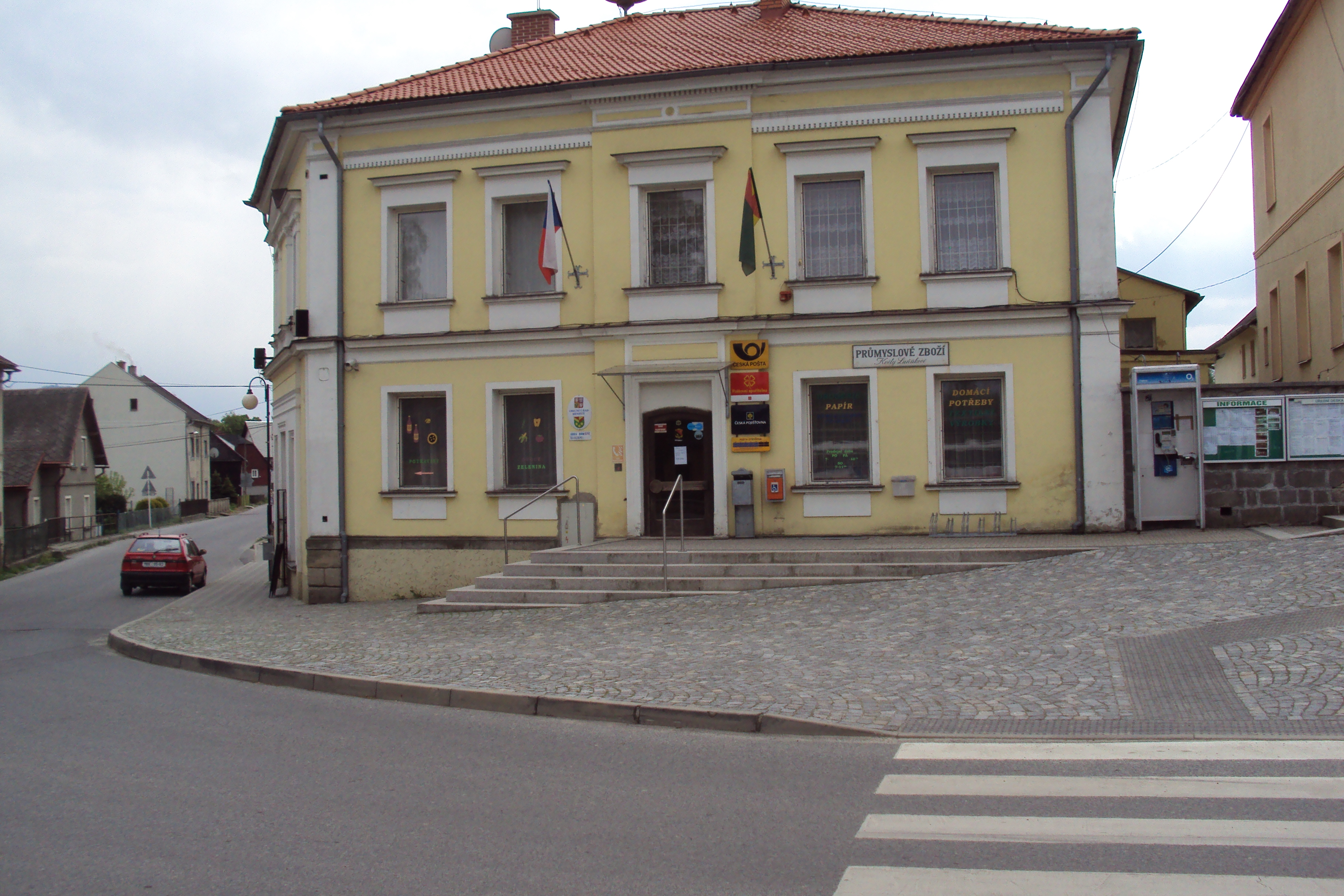 Obecní úřad a pobočky bank v centru obce Brniště